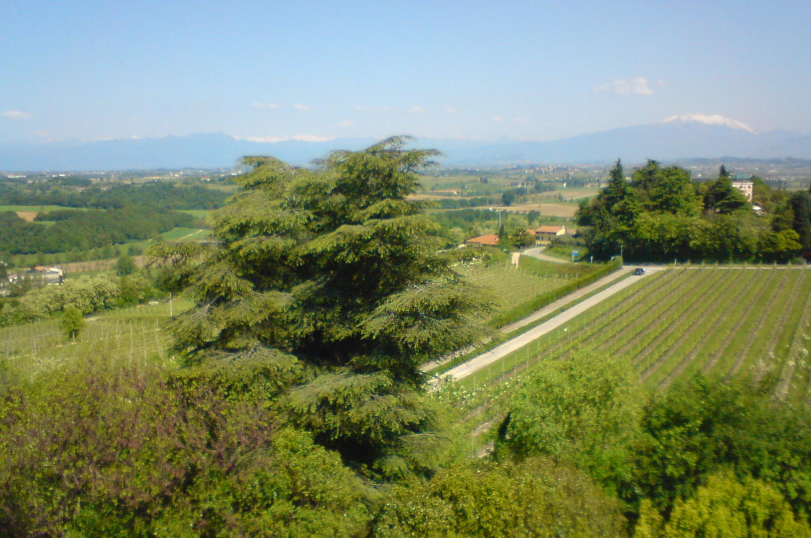 Blick vom Beinhaus in Custoza Richtung Alpen Ossario di Custoza